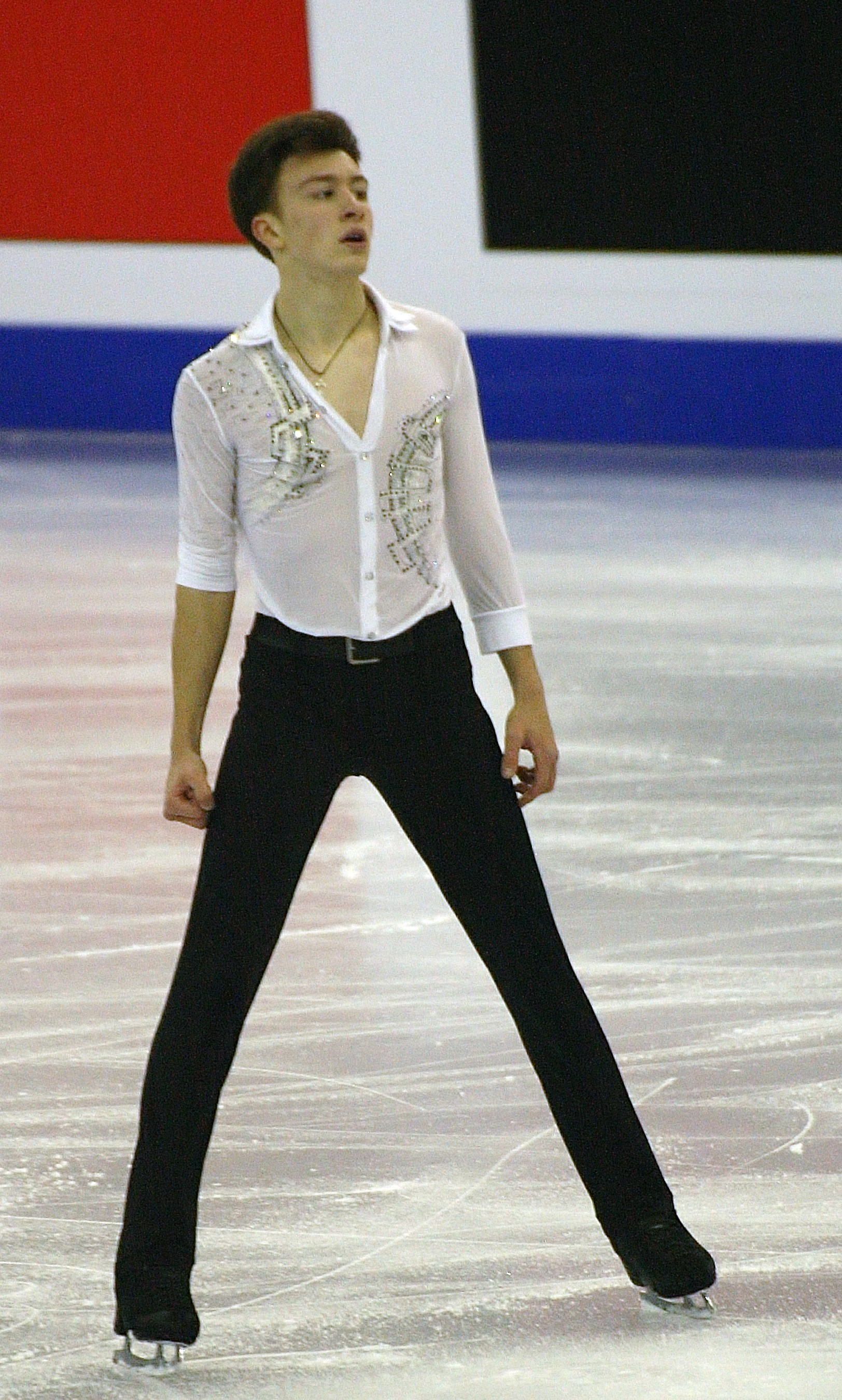 Дмитрий Алиев (Россия) на финале Гран-при по фигурному катанию среди юниоров 2015-2016.